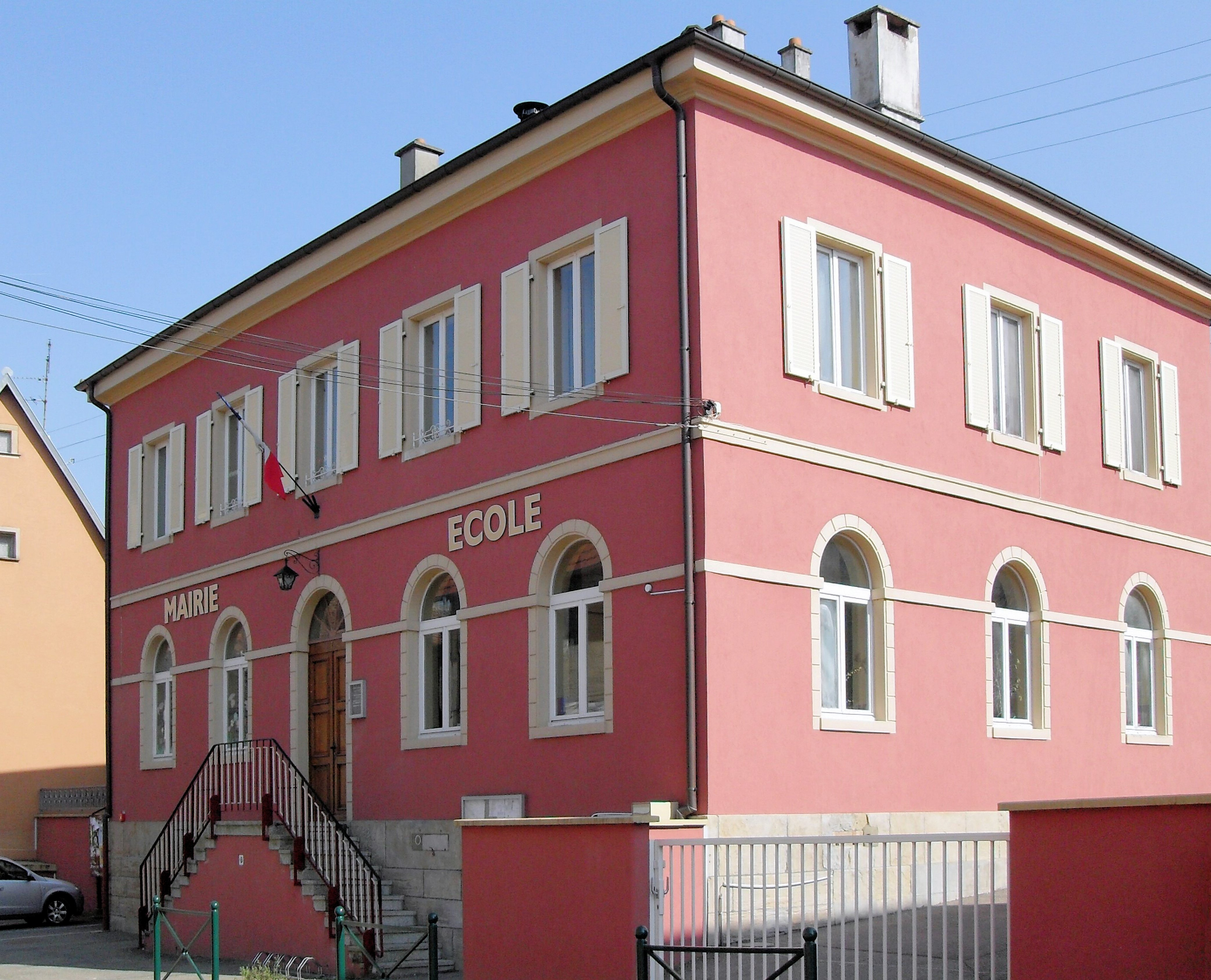 La Mairie-école de Luemschwiller